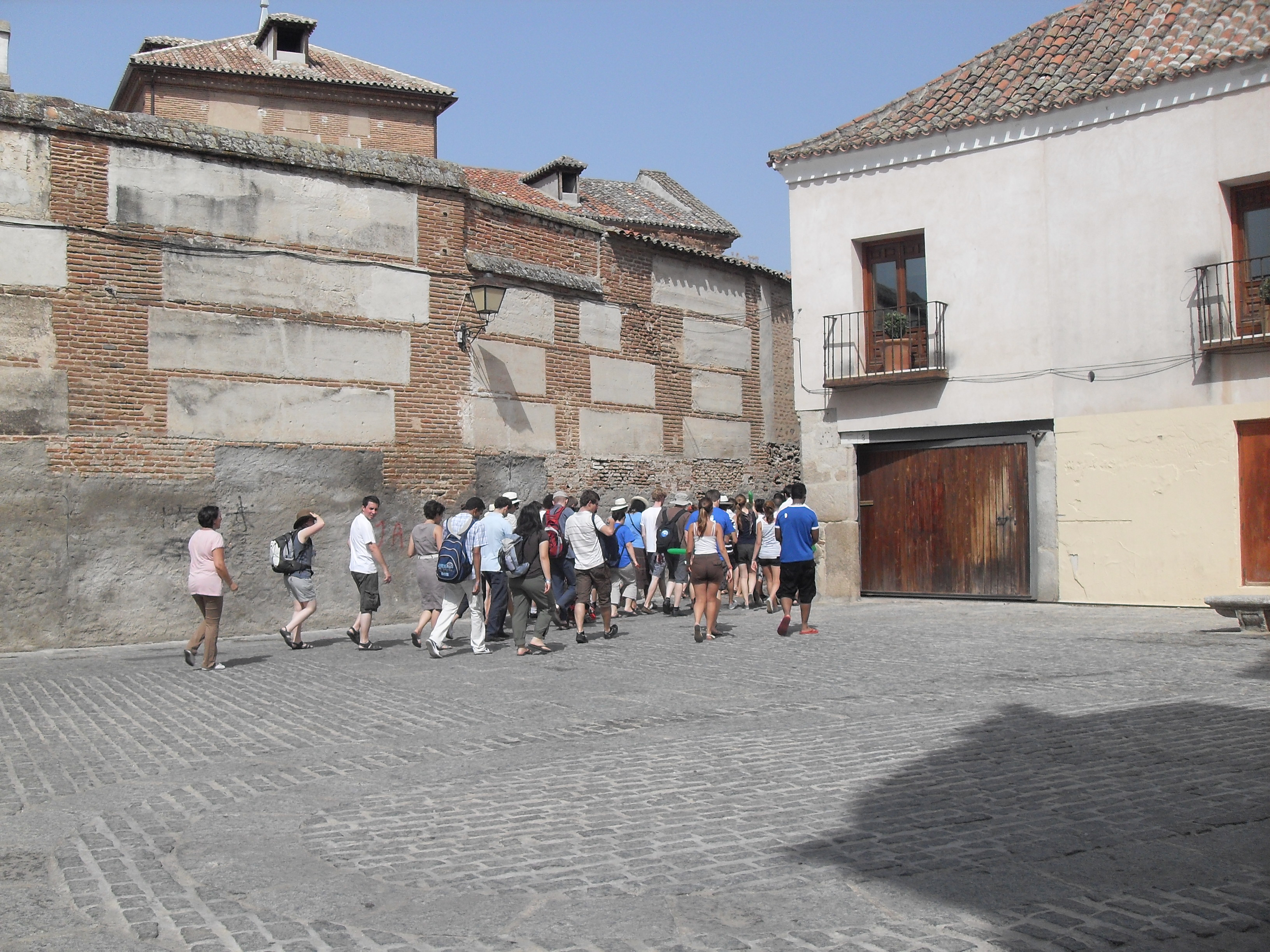 Grupo de Turistas por el Casco Antiguo de la Ciudad